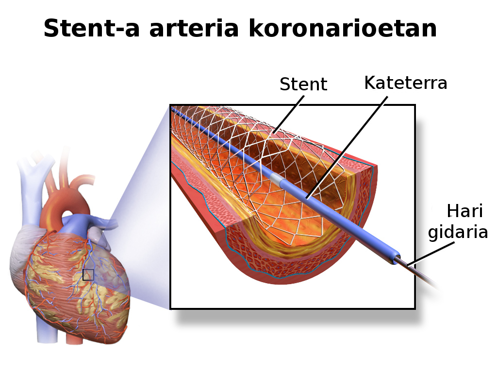 Stent baten kokapena arteria koronarioetan